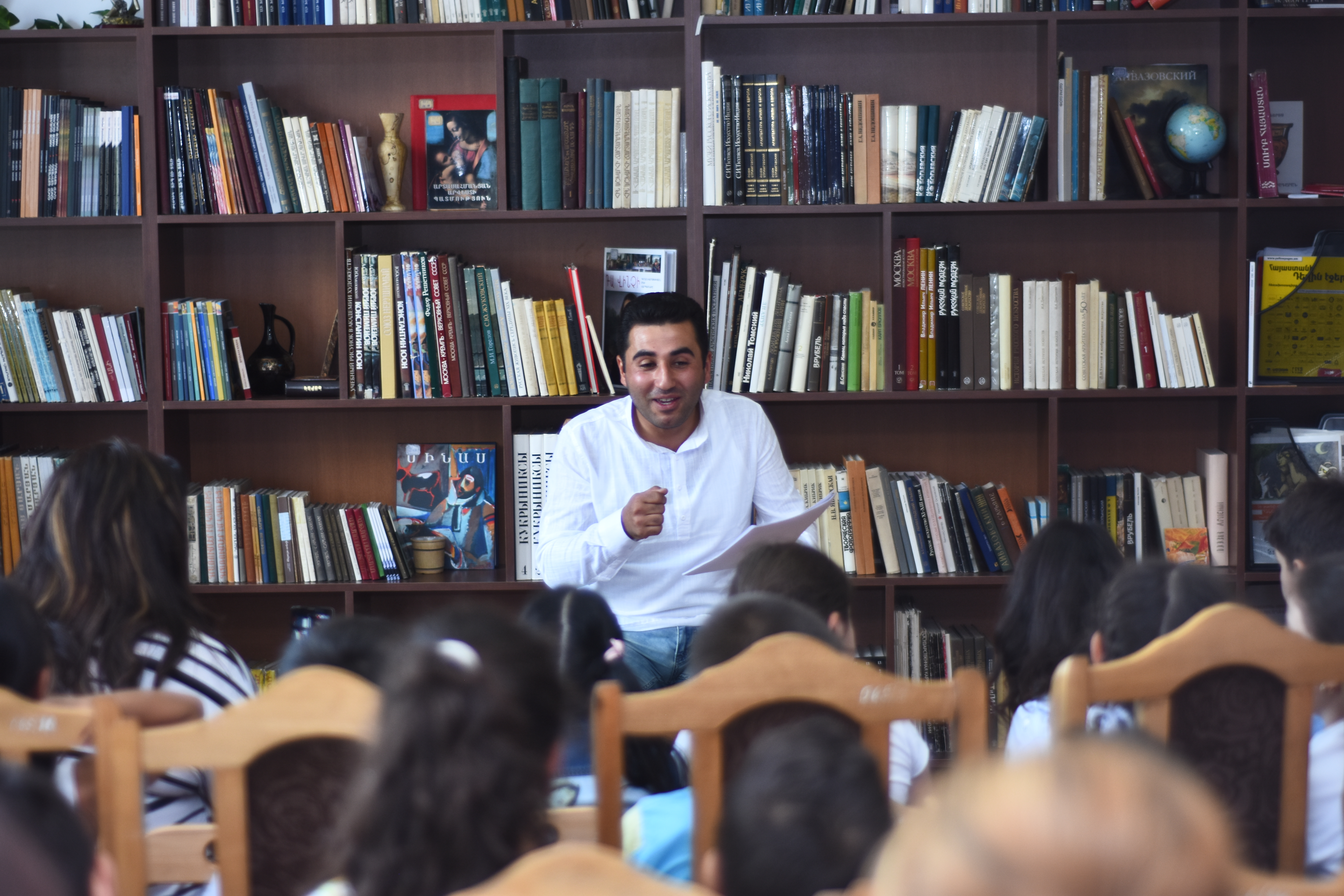 Ընթերցում են հայտնիները/ Արմեն Այվազյան